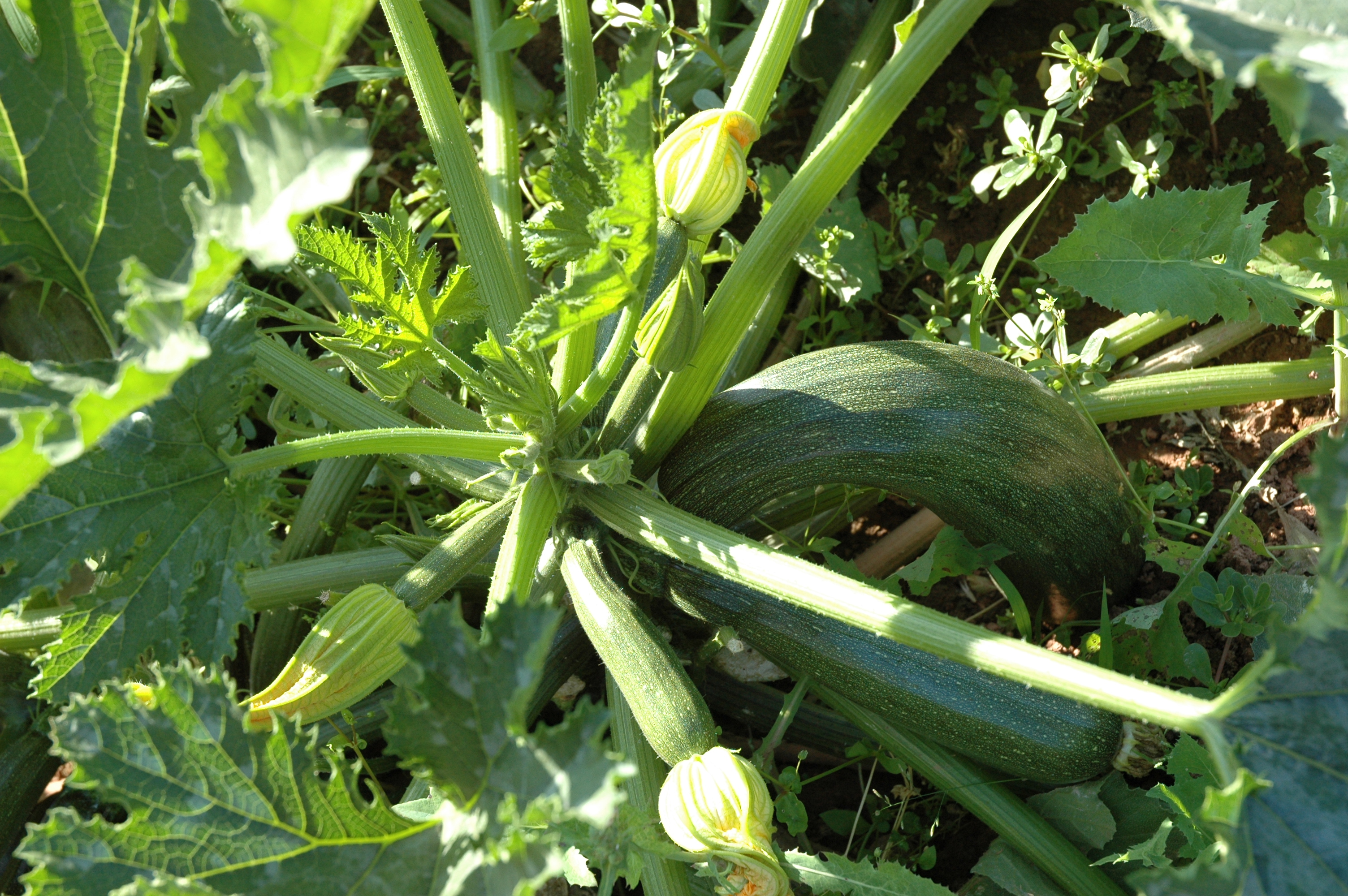 Planta de carbassó